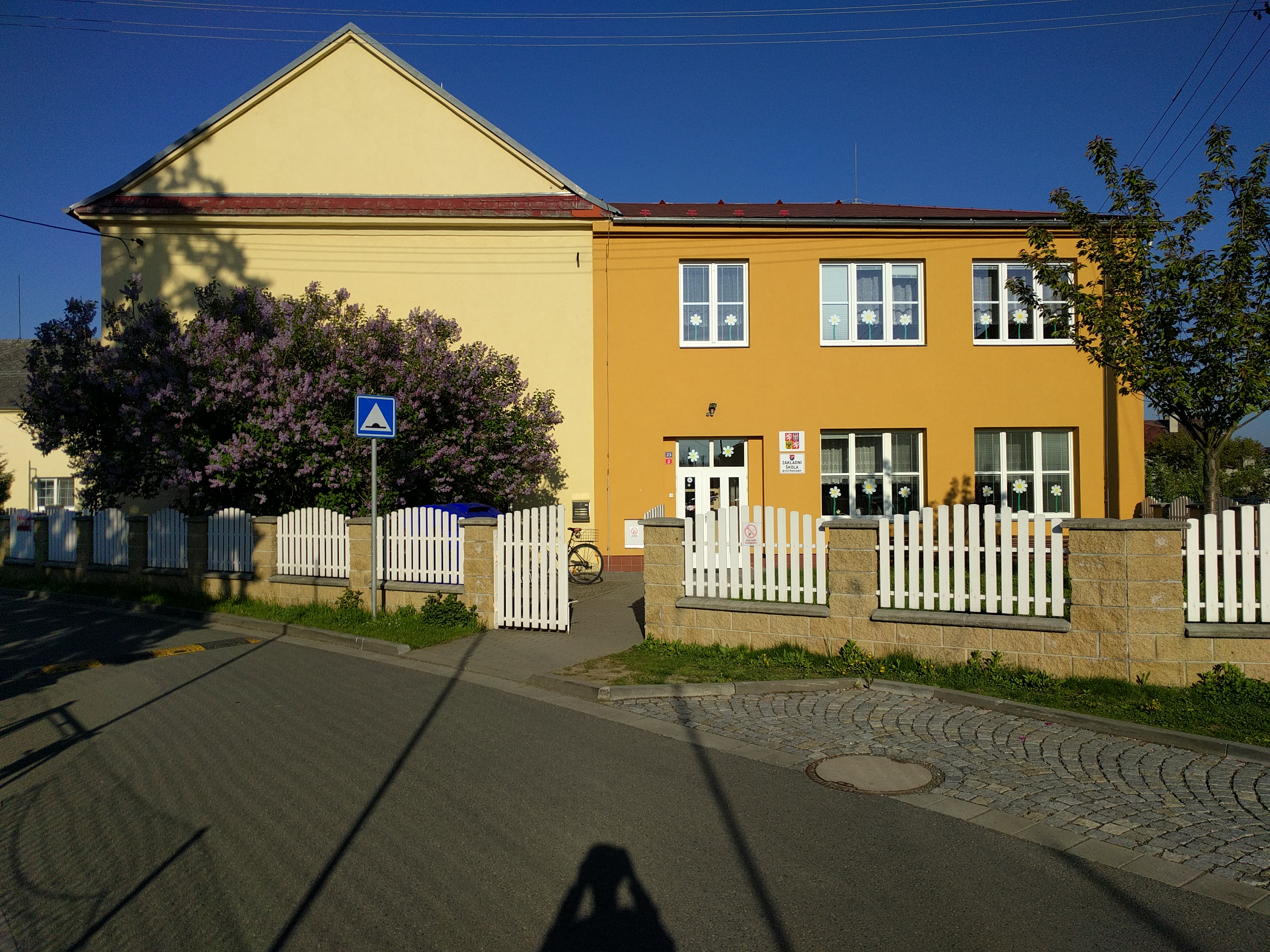 Základní škola Bystrovany